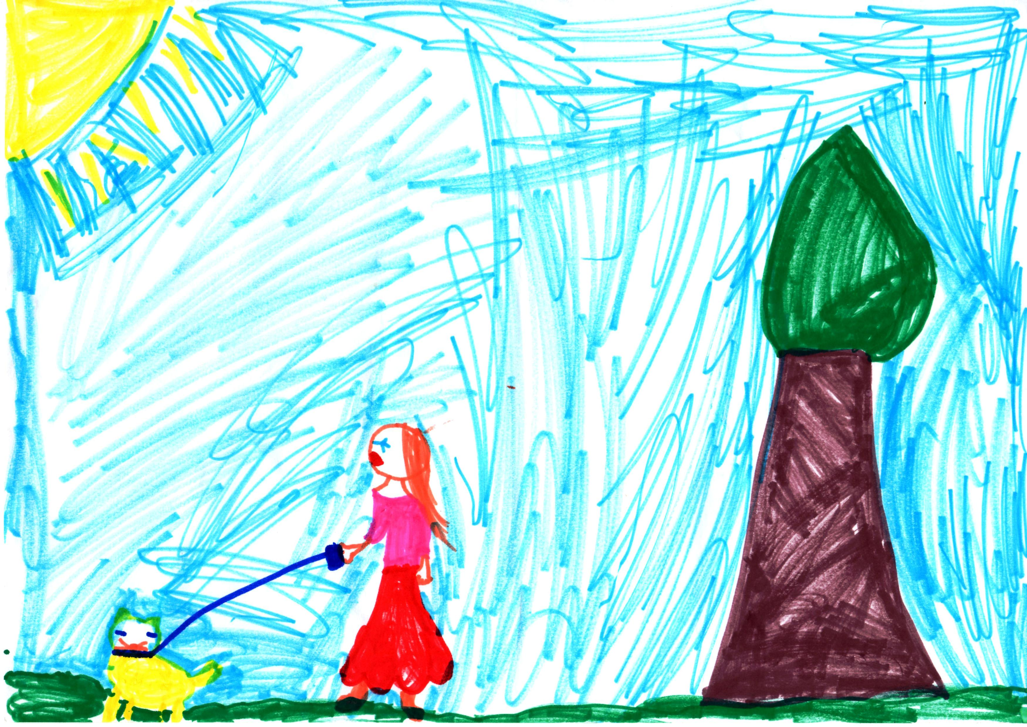 שלב ראשית הריאליזם